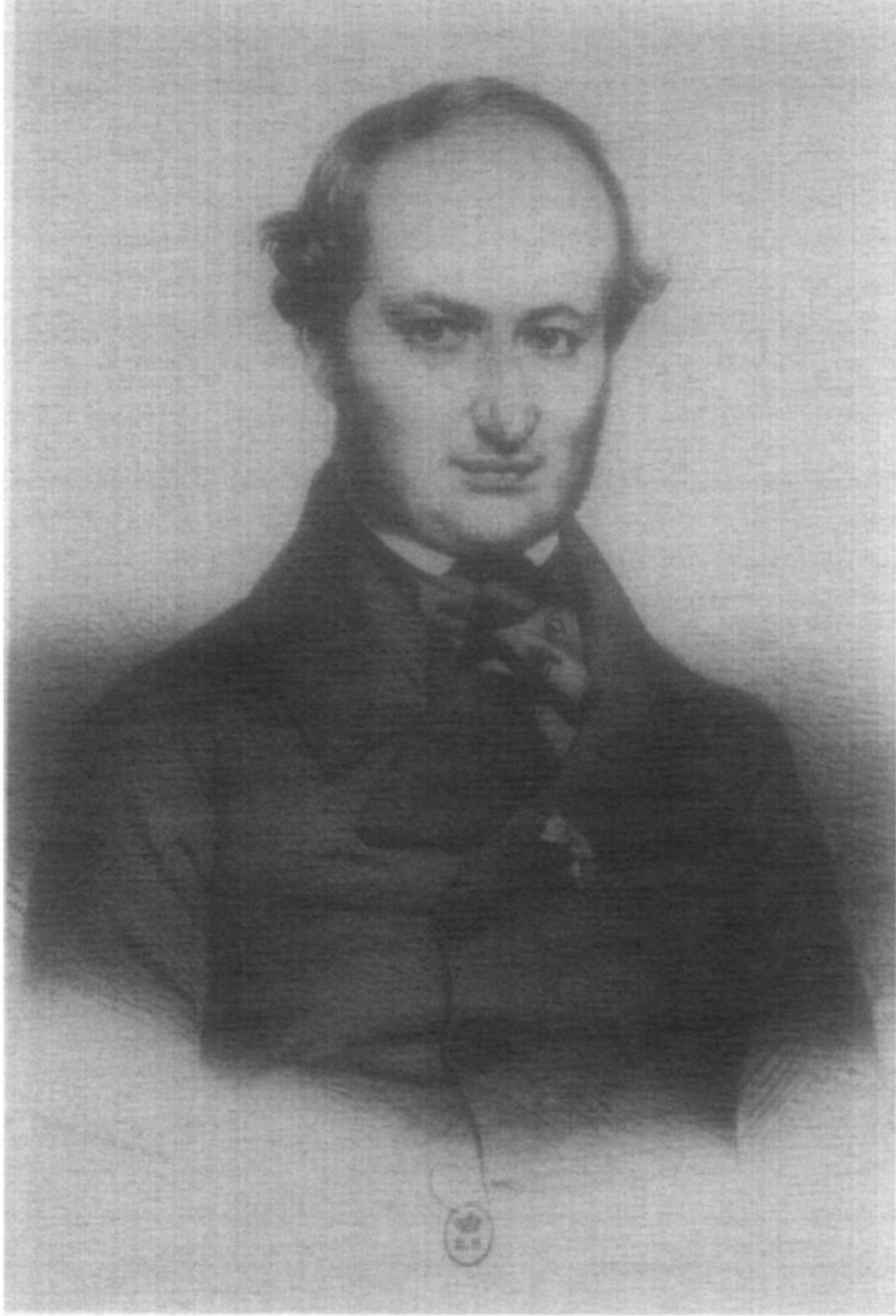 Портрет Жозефа-Фредеріка-Бенуа Шарр'єра